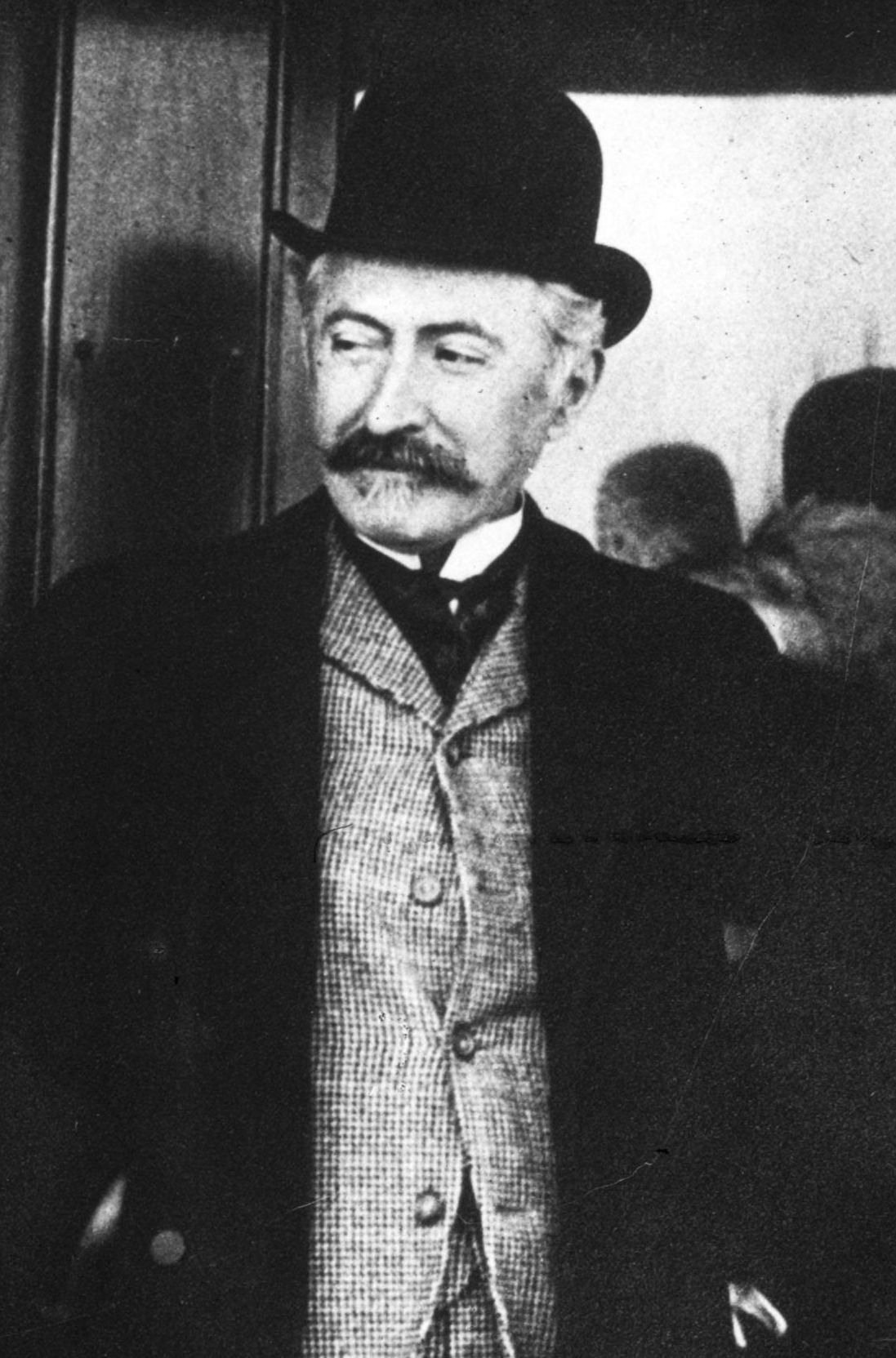 Charles Guillaume Frédéric Boson de Talleyrand-Périgord (1832-1910)